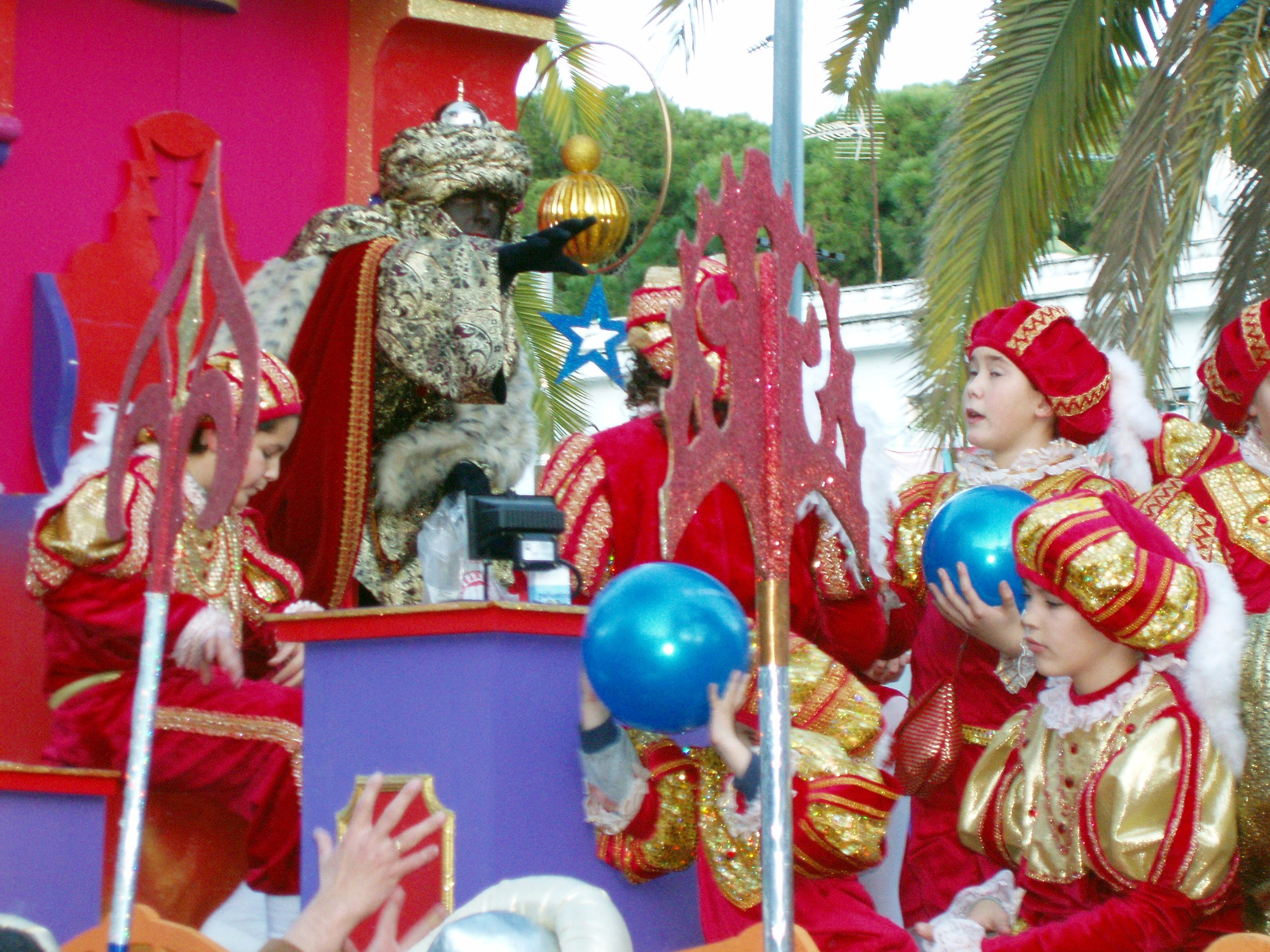 Cabalgata de Reyes Magos en El Puerto de Santa María, Cádiz, España. (Año 2006)